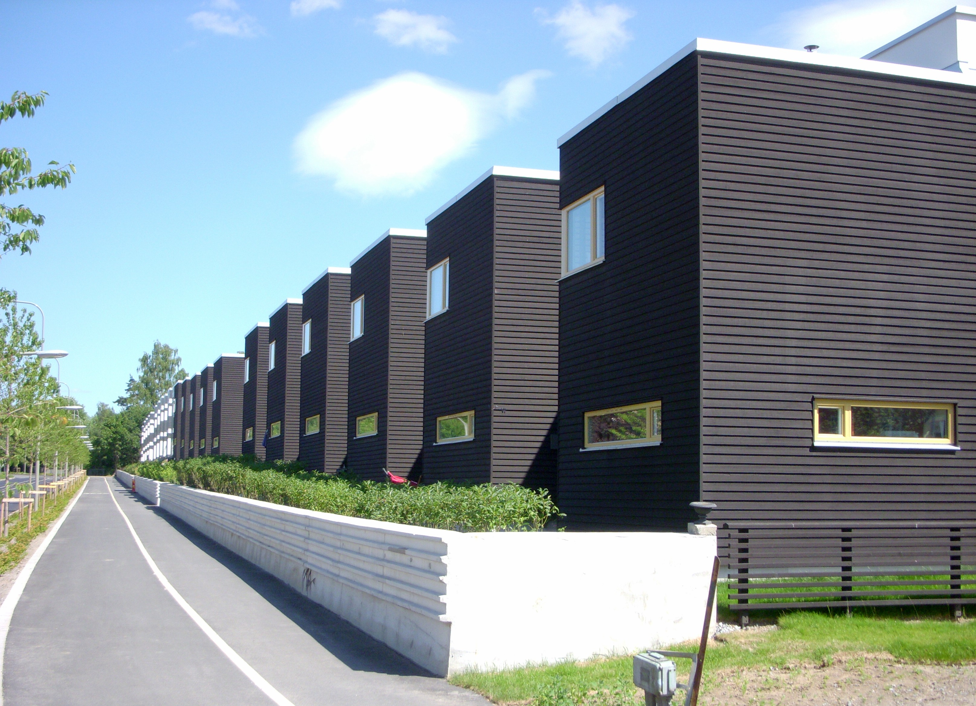 Kvarteret Barnmorskan, södra delen